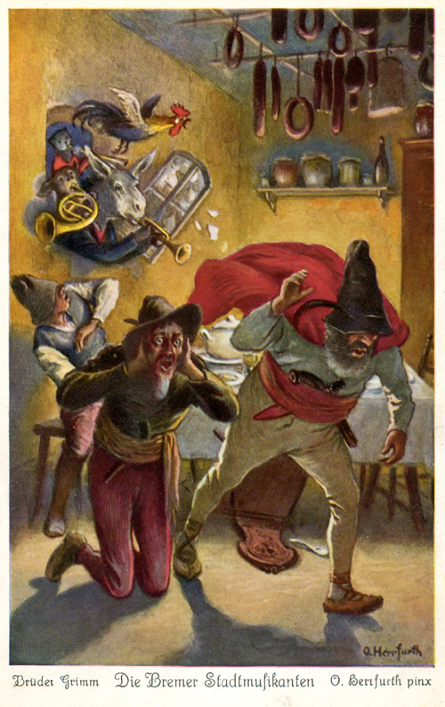 Die Bremer Stadtmusikanten. Postkartenserie nach dem Märchen der Brüder Grimm. Serie von sechs Postkarten der Firma Uvachrom, Gesellschaft für Farbenphotographie m.b.H., München - Stuttgart. Serie 285, Nr. 4698.